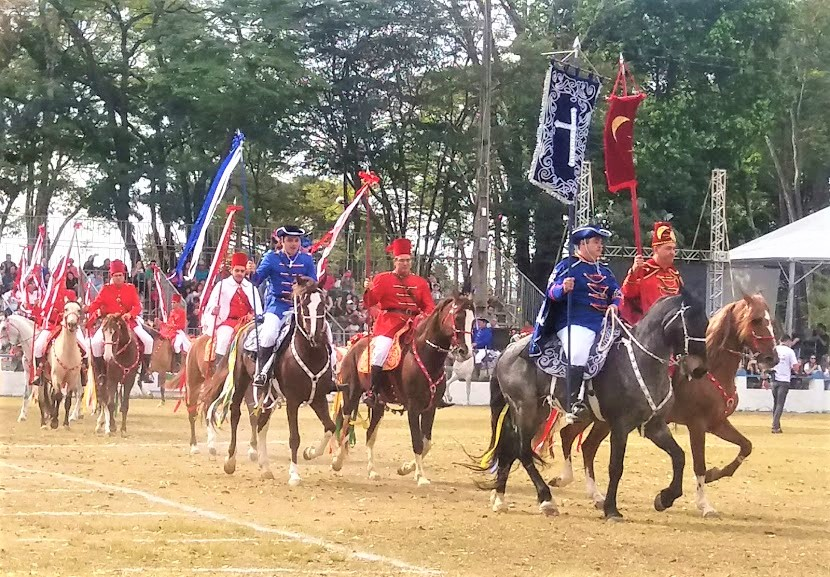 Cavalhadas de Franca, Franca, SP, Brasil